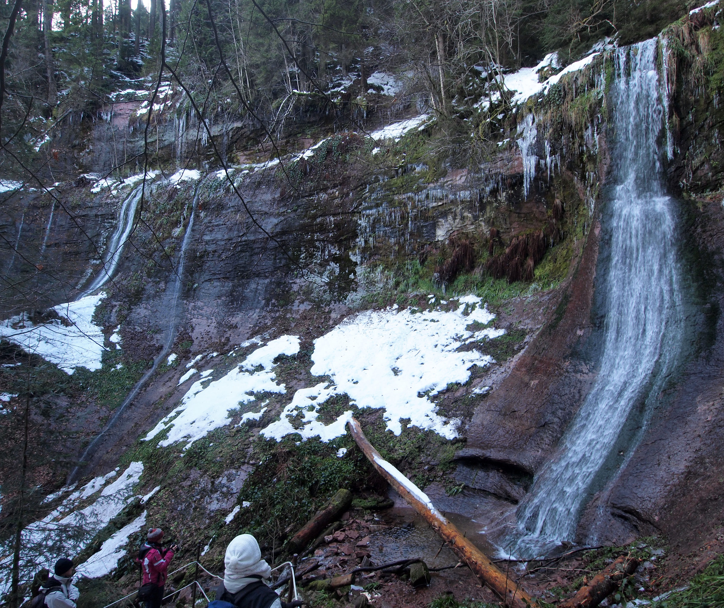 Sankenbach-Wasserfälle